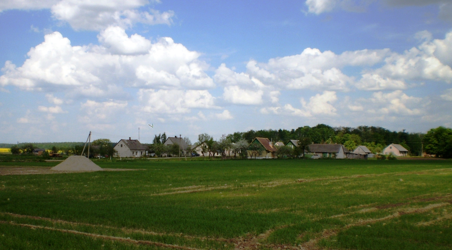 Alksnėnai, Kėdainių raj.